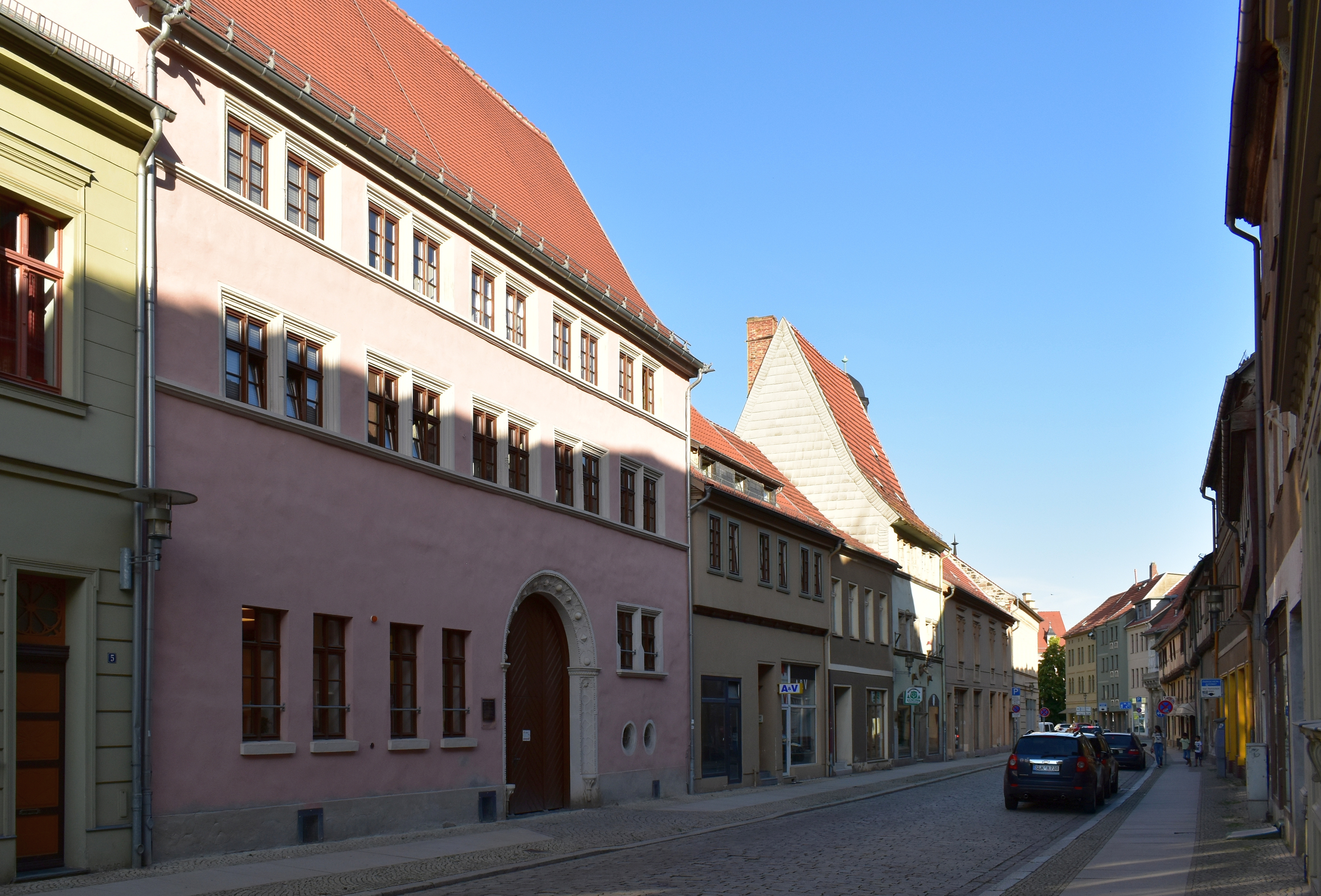 Gebäude Hohe Straße 1-4 in Aschersleben